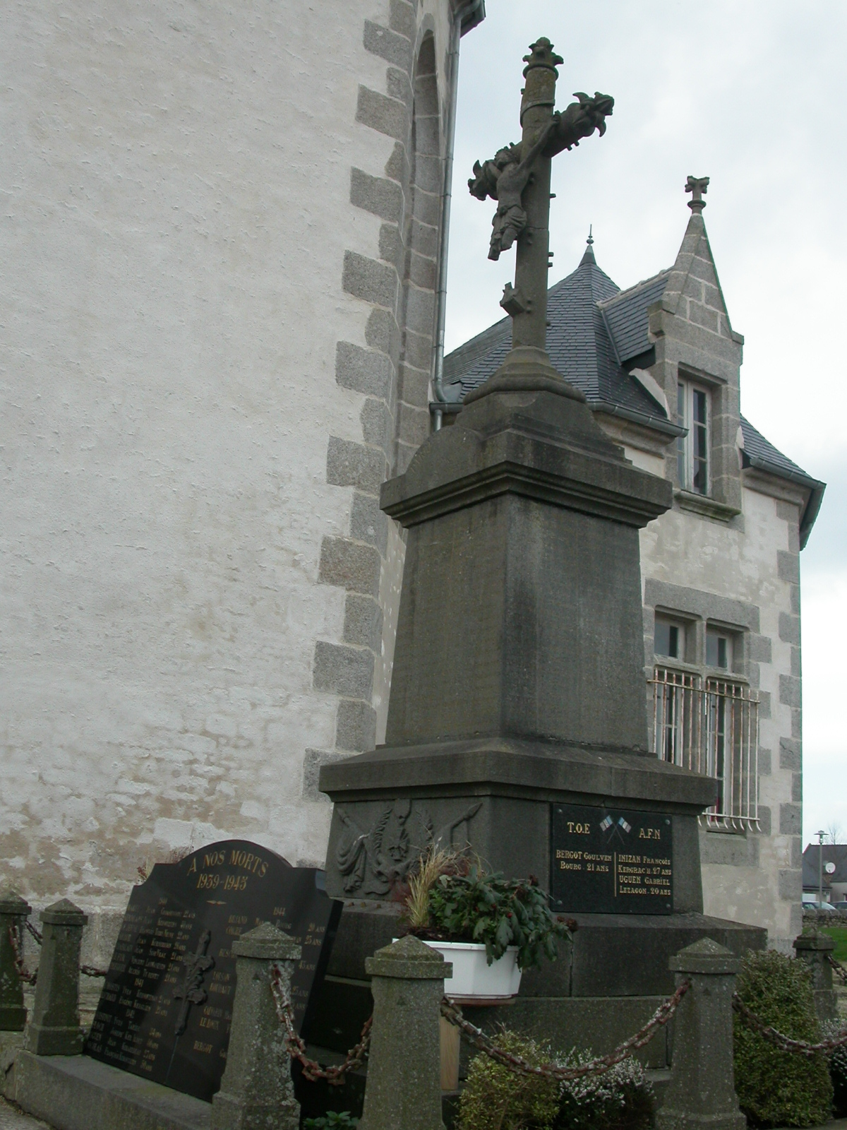 Monument aux morts - Plouvien-29